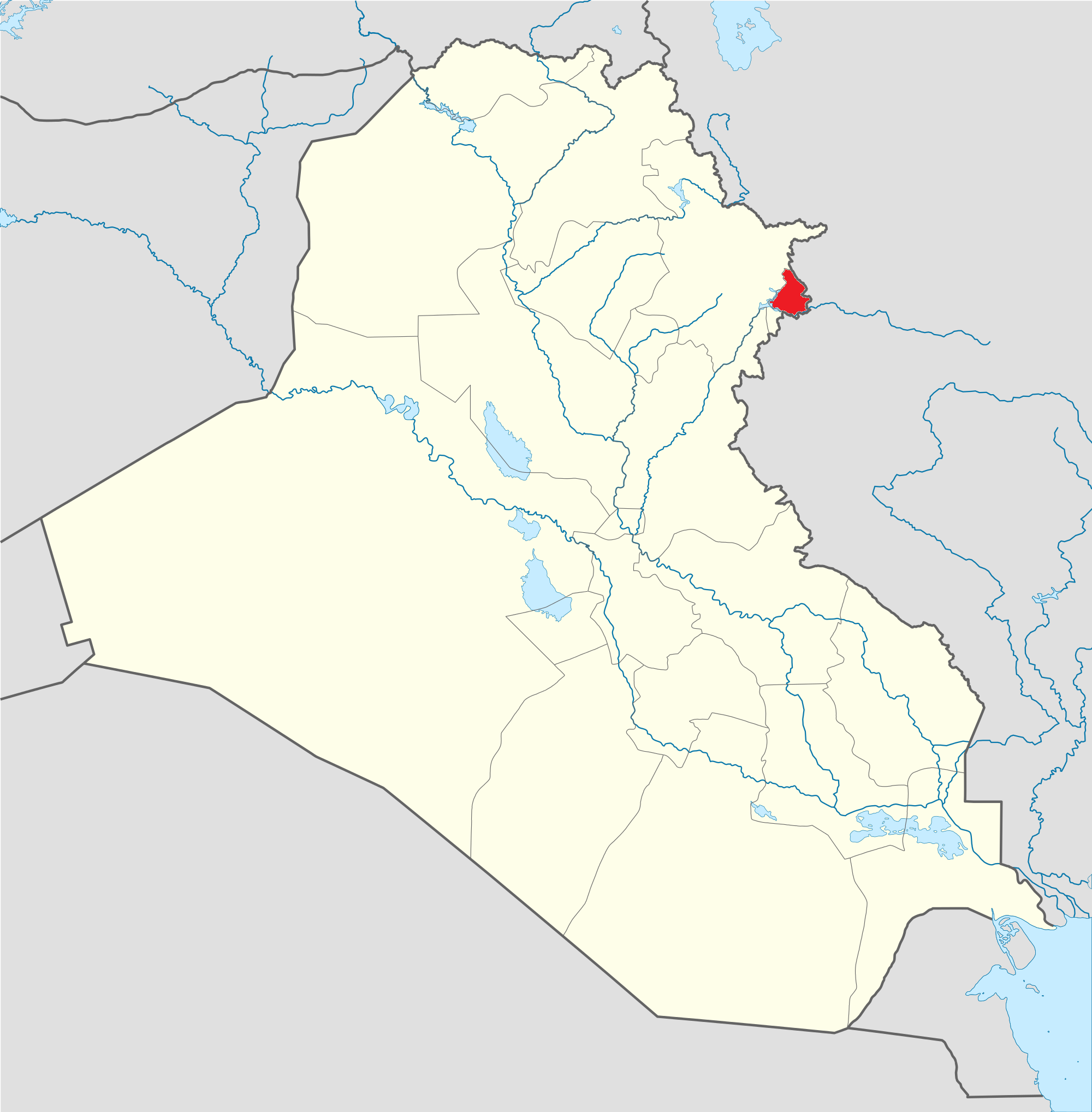 ハラブジャ県（Halabja Governorate）の位置 参考 - File:Kurdistan governorates 2015.png, [1]